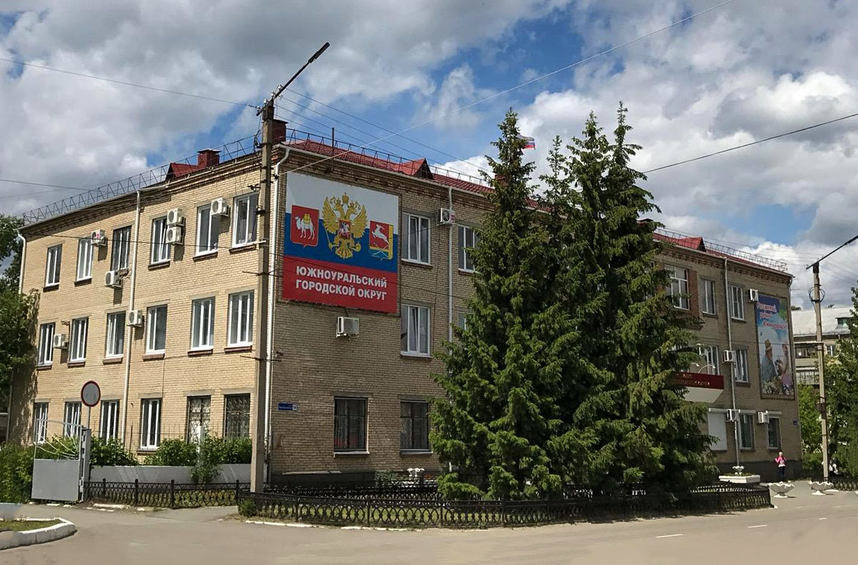 Здание администрации Южноуральского городского округа